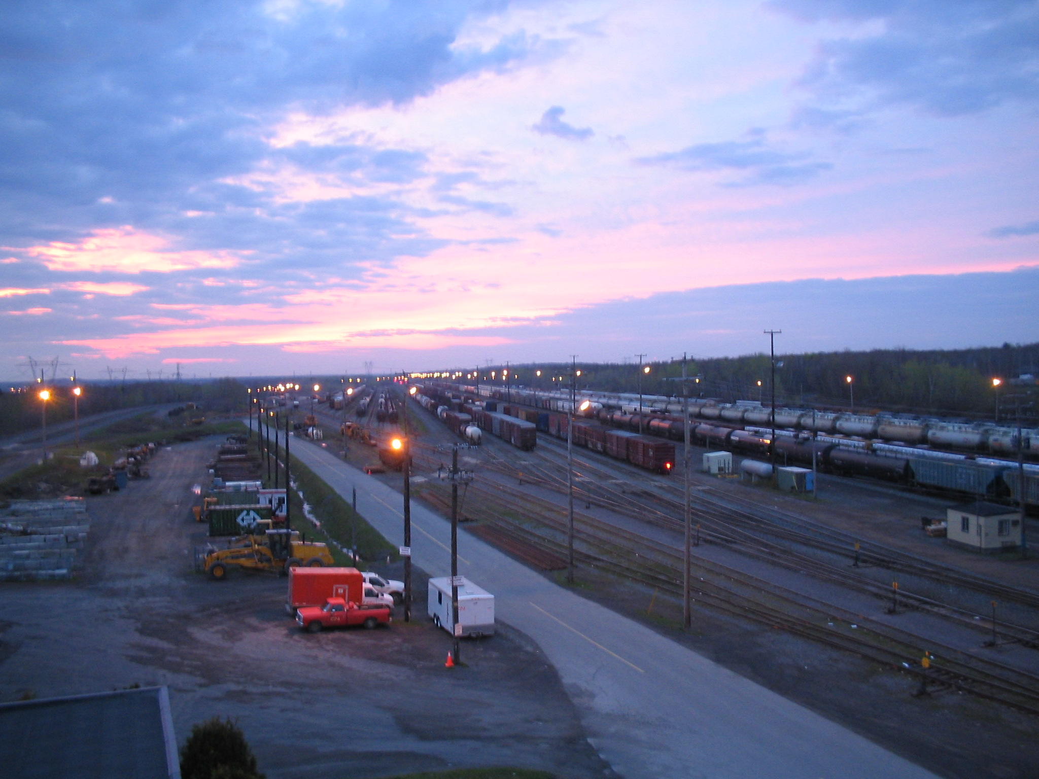 Vue du Triage Joffre du Canadien National, à Charny au sud de Québec au printemps 2006.